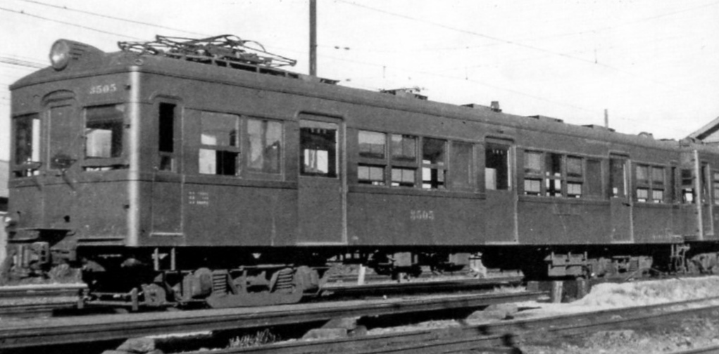 モ3500形3505。未電装、3扉で登場したときの姿。